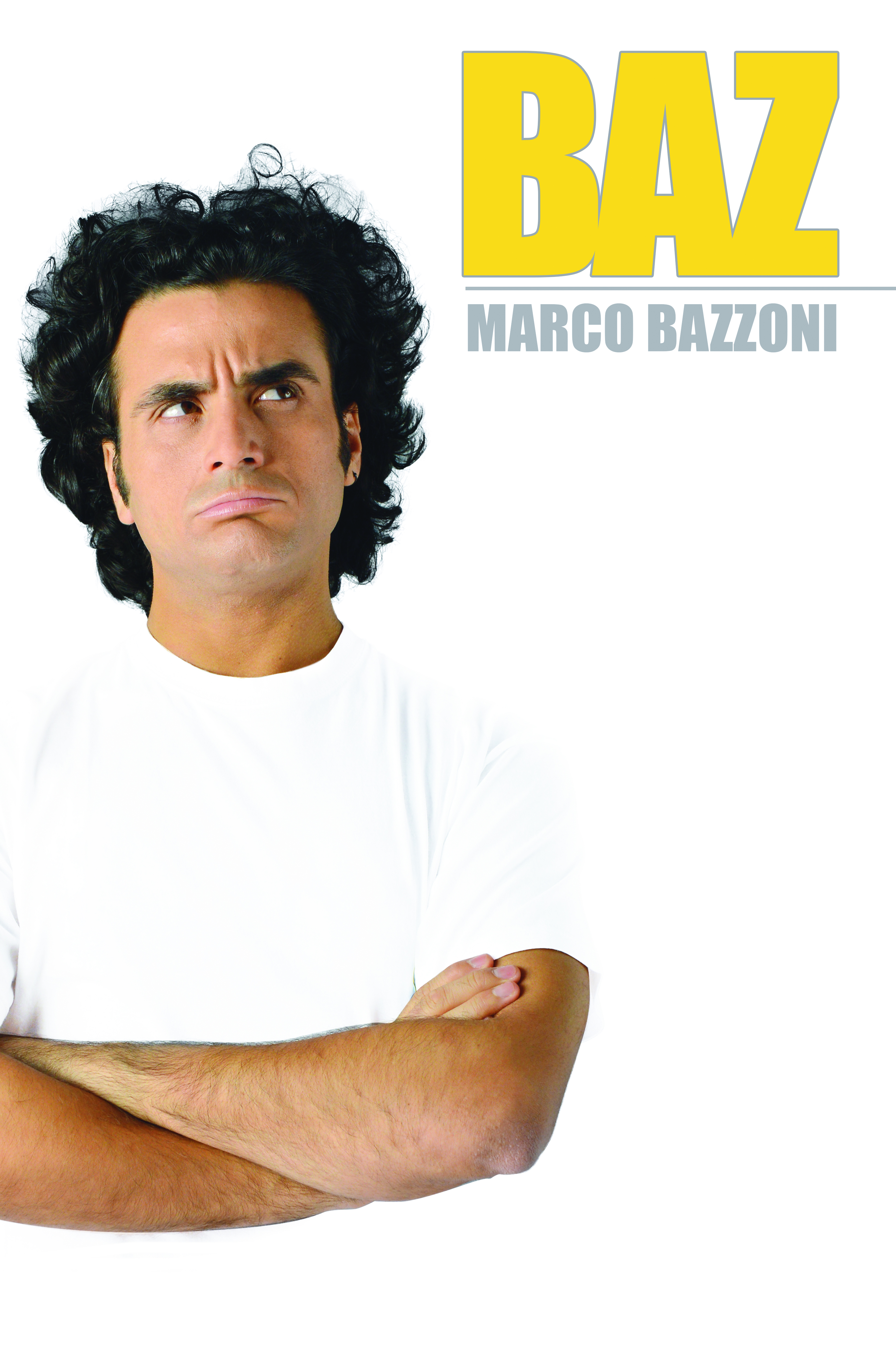 Comico Italiano